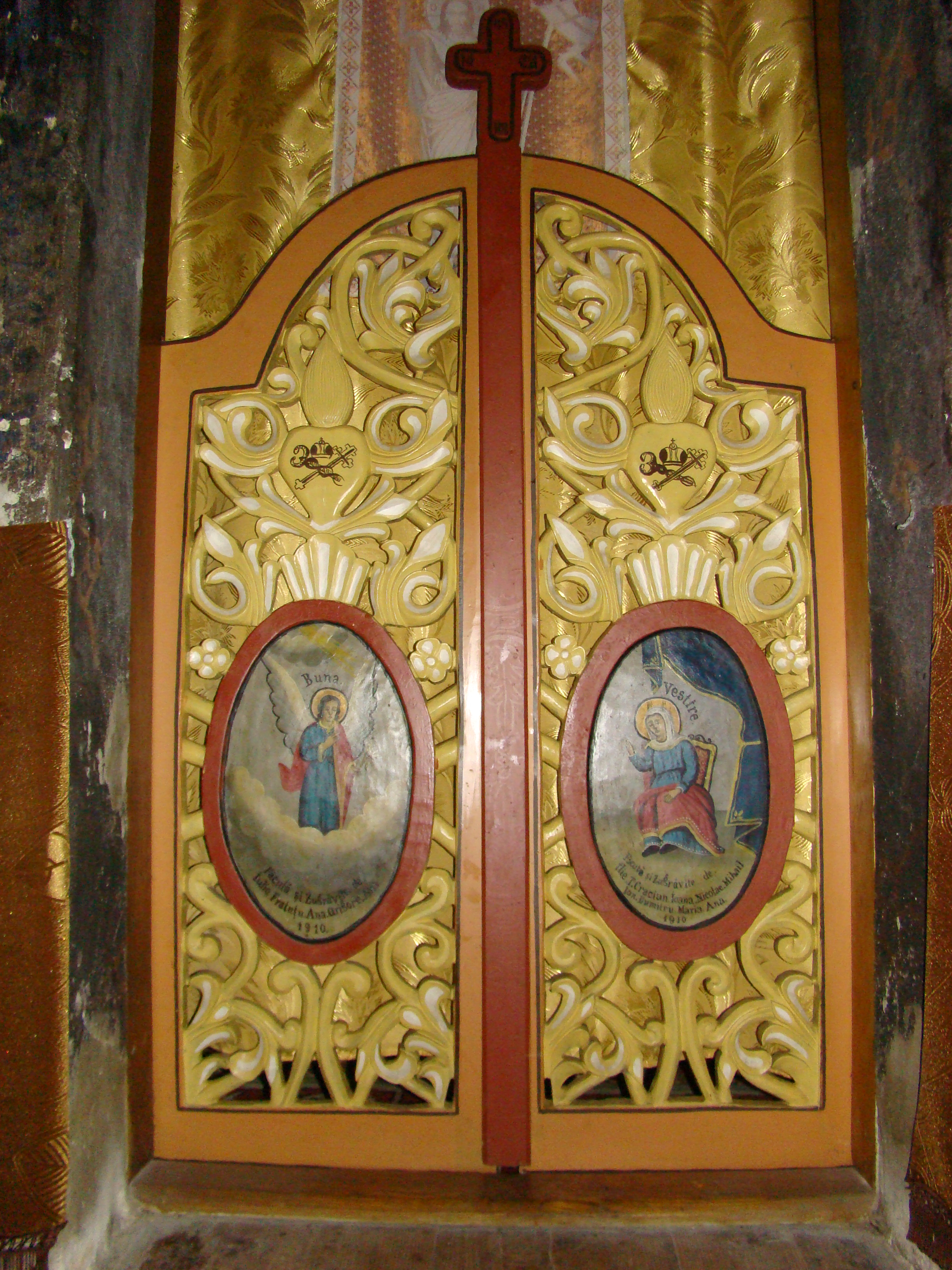 Biserica de lemn „Sfinții Voievozi” din Titerlești, județul Mehedinți